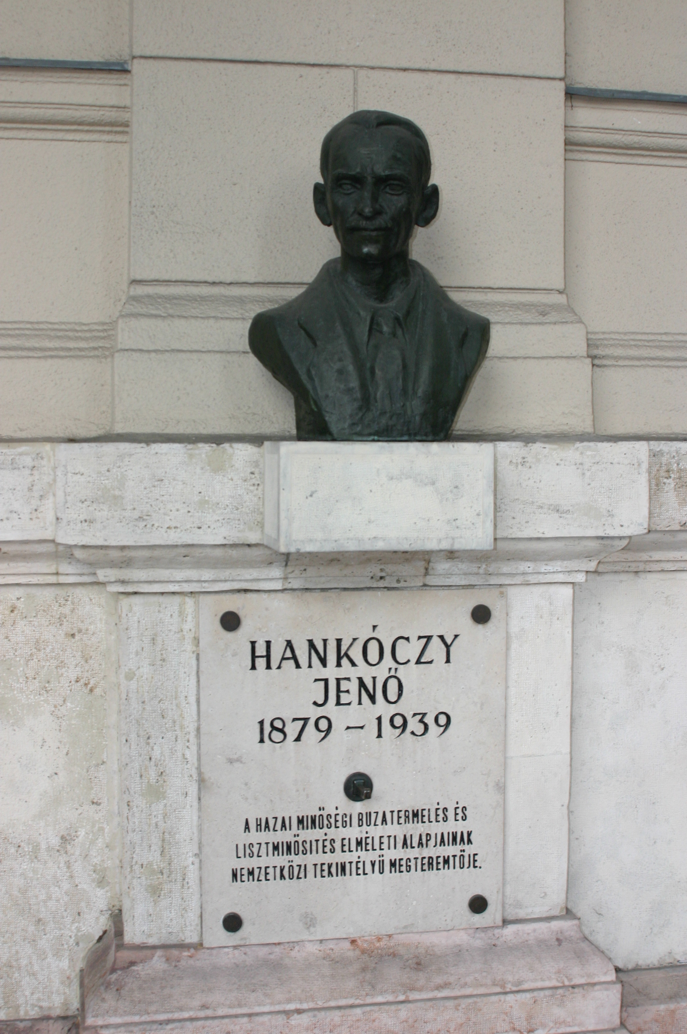 bust of Hankóczy Jenő